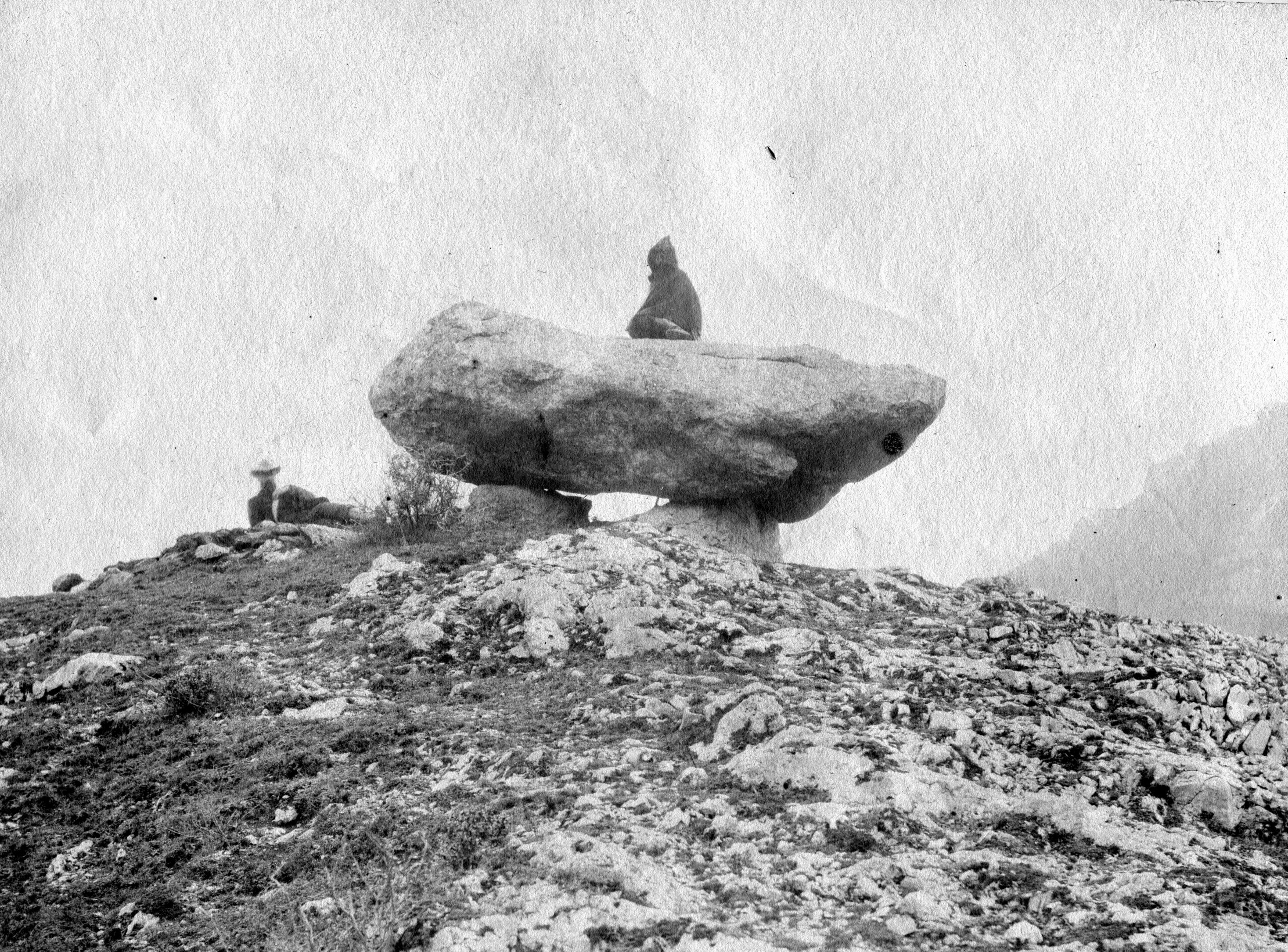 Fonds Trutat - Photographie ancienne Lieu de création : Vicdessos (Ariège ; canton) Observations : Notes manuscrites Trutat : "Hémisph[érique] rapide ; papier Morgan ; B 228 ; Congrès géologique". Mot(s)-clé(s) : -- Montagne -- Rocher -- Bloc (roche) -- Végétation -- Homme -- Congrès [Mention / citation] -- Géologie [Mention / citation] -- Automne -- Vicdessos (Ariège ; canton) -- Vicdessos (France ; vallée) -- Pyrénées (France) -- 19e siècle, 4e quart